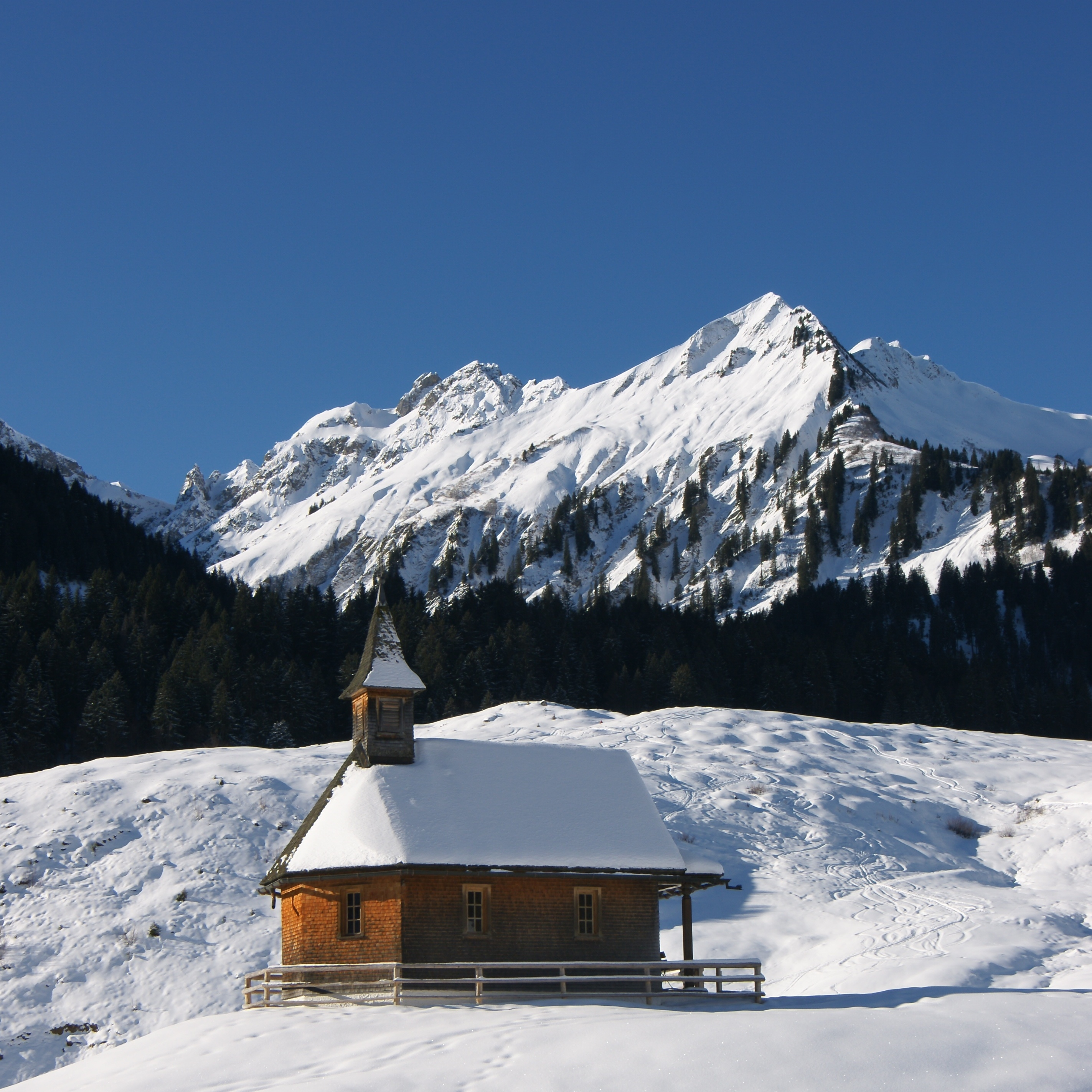 Vor dem 2.010m hohen Toblermann liegt die: aus dem DEHIO Vorarlberg 1983: Kapelle Hl. Maria, in Schoppernau - Schalzbachvorsäß. 1981 nach Plan von Kaspar Felder erbaut. Rechteckholzbau mit 3/8-Abschluß, Satteldach mit Glockenturm über dem Chor, Vorzeichen auf Holzstützen mit Pultdach. Innenraum mit offenem Dachstuhl. Figur Hl.Maria mit Kind, von Wofgang Graf 1981.